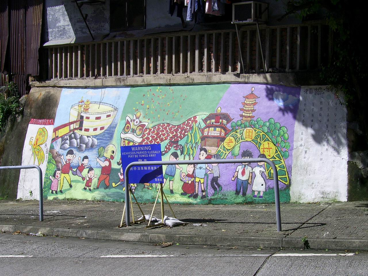 中文（香港）: 荃灣老圍其中一幅壁畫